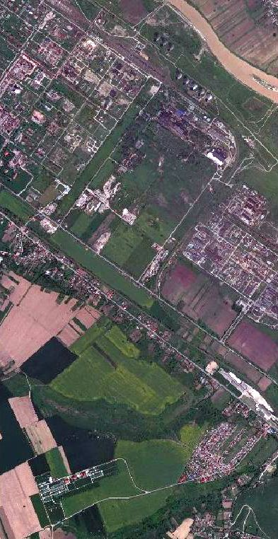 Termocentrala Borzești și stația electrică de transformare Gutinaș pe harta satelit.